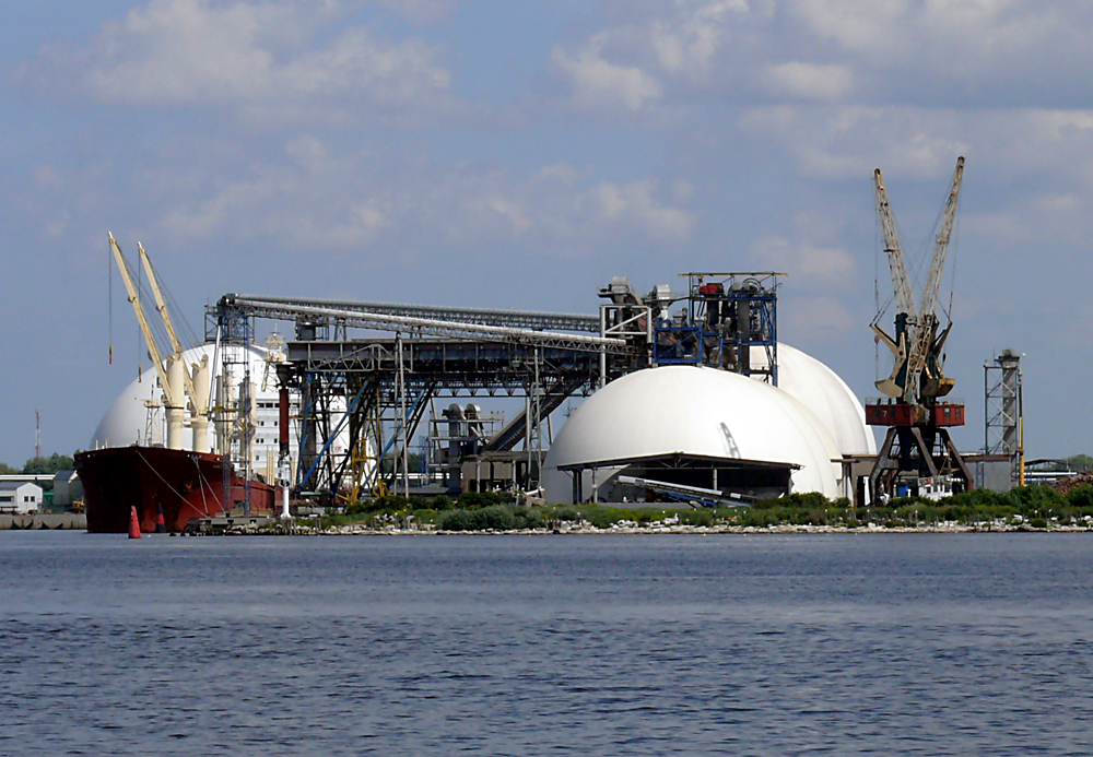 Rīgas ostas ķīmisko kravu pārkraušanas termināls. Fotogrāfējis A.Buks 17.07.2009.